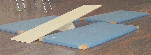 Bodenmatten und Wippe für den Turnunterricht mit Kindern und Kleinkindern. selbst fotografiert am 22.12.05